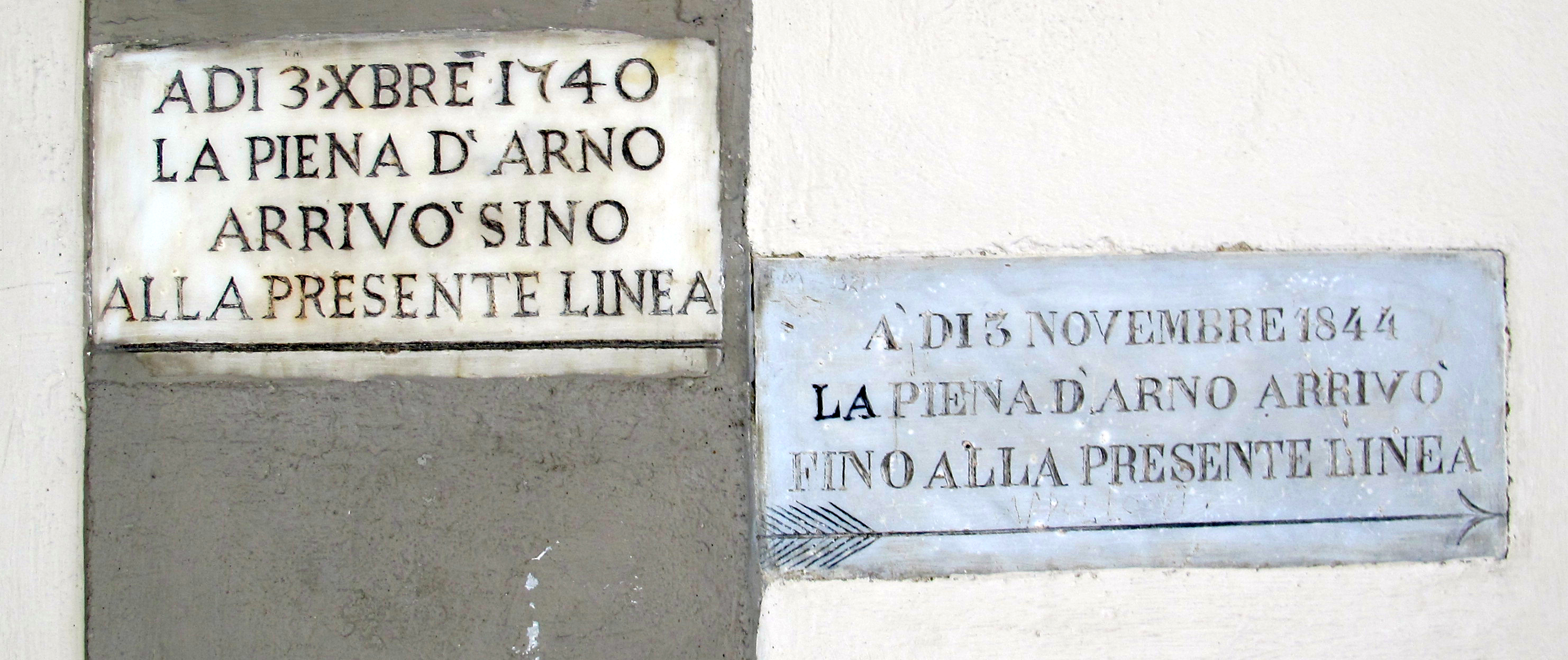 San jacopo tra i fossi, chiostro, targhe alluvioni 1740 e 1844